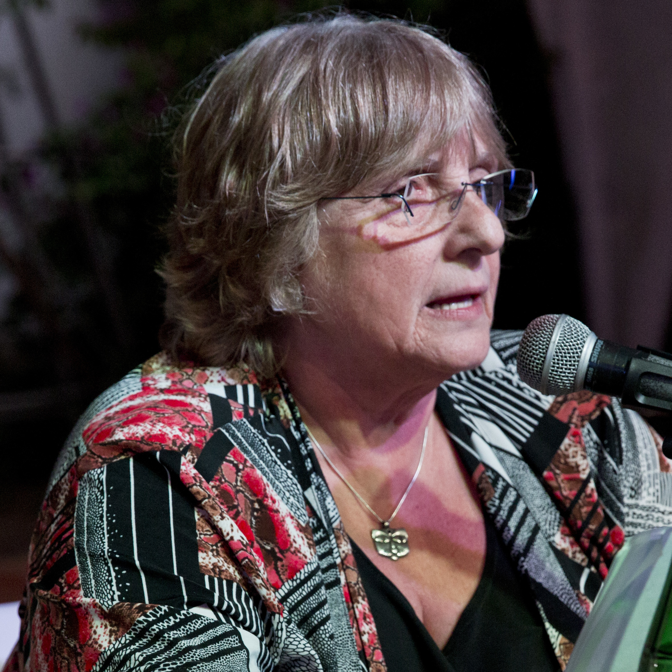 María Seoane Lanzamiento Antología de Manifiestos Políticos Argentinos (1890-1956, Tomo I), Buenos Aires, 2015.